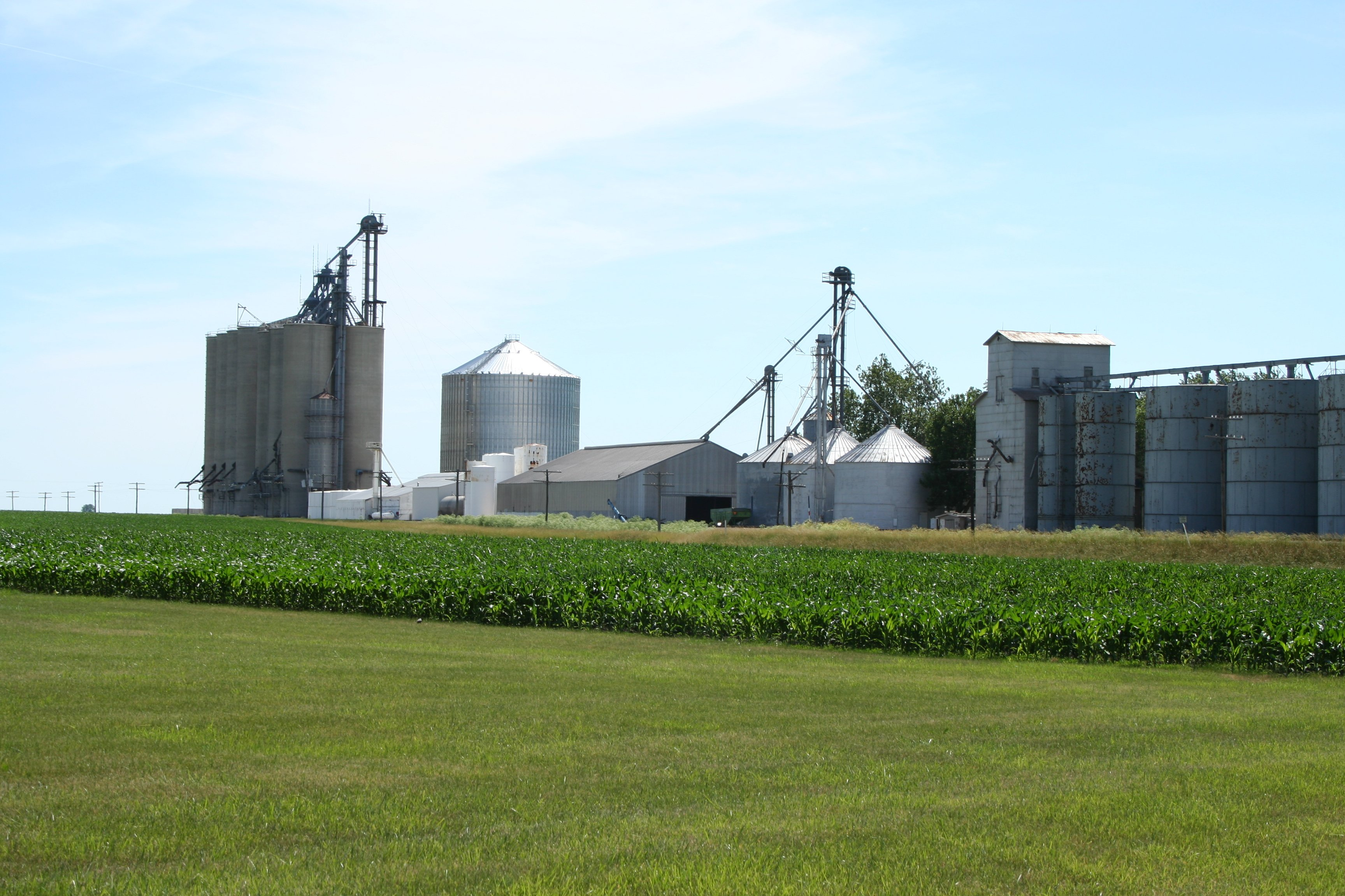 Galesville_Illinois elevators